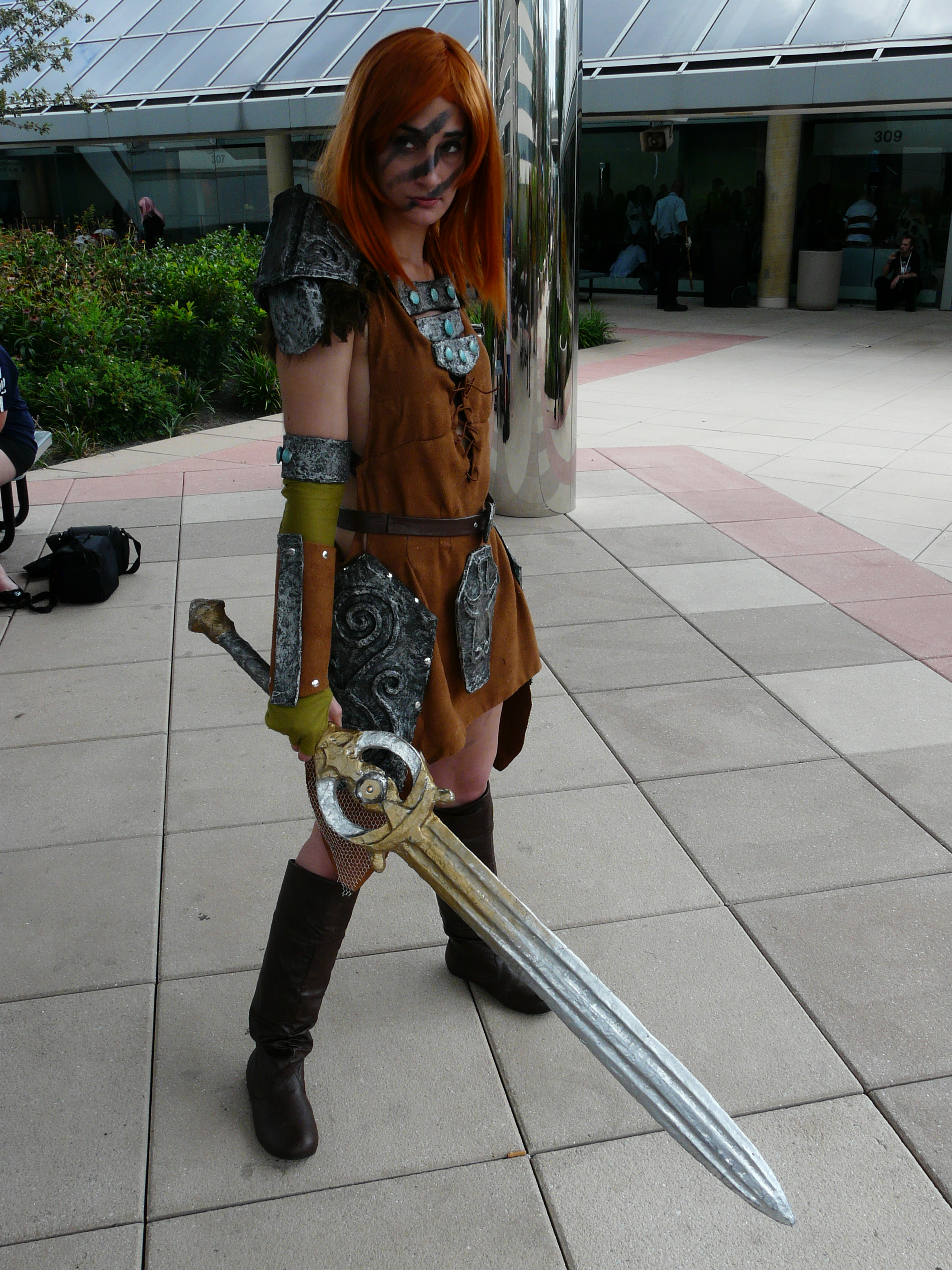 Otakon 2012 cosplay